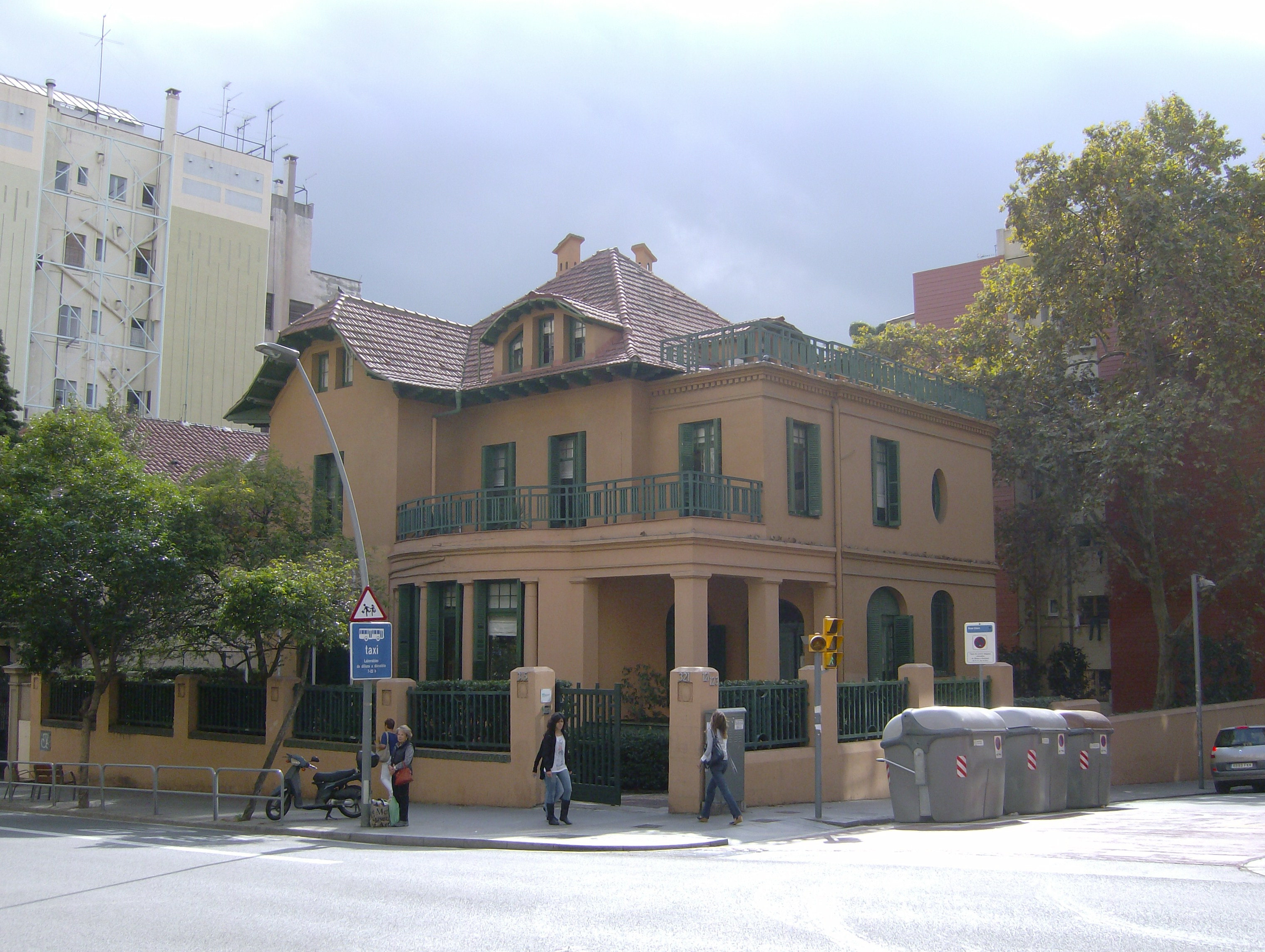 Fotografia de la seu de l'Àrea de Barcelona de l'Autoritat del Transport Metropolità (ATM), al Carrer de Muntaner, 315, barri de Sant Gervasi - Galvany, de la ciutat de Barcelona.